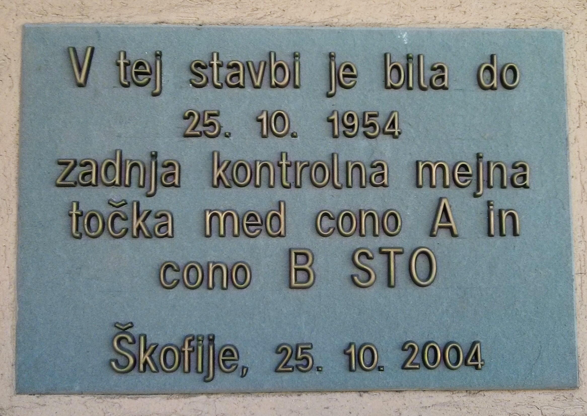 V tej stavbi je bila do 25.10.1954 kontrolna tocka med cono A in cono B STO.